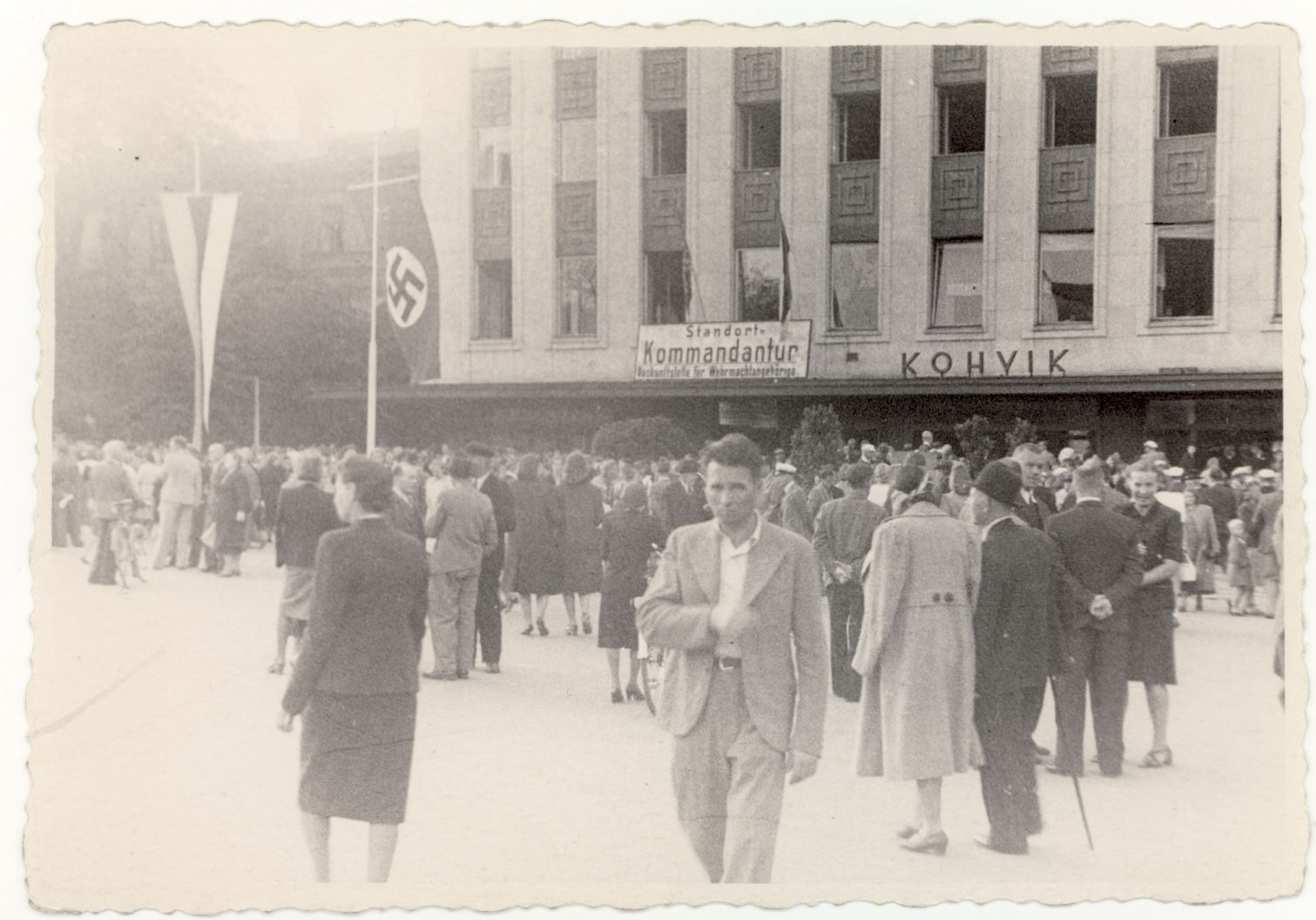 Vaade Vabaduse väljak 10 majale. Rahvahulga kogunemine kohviku Kultus ette